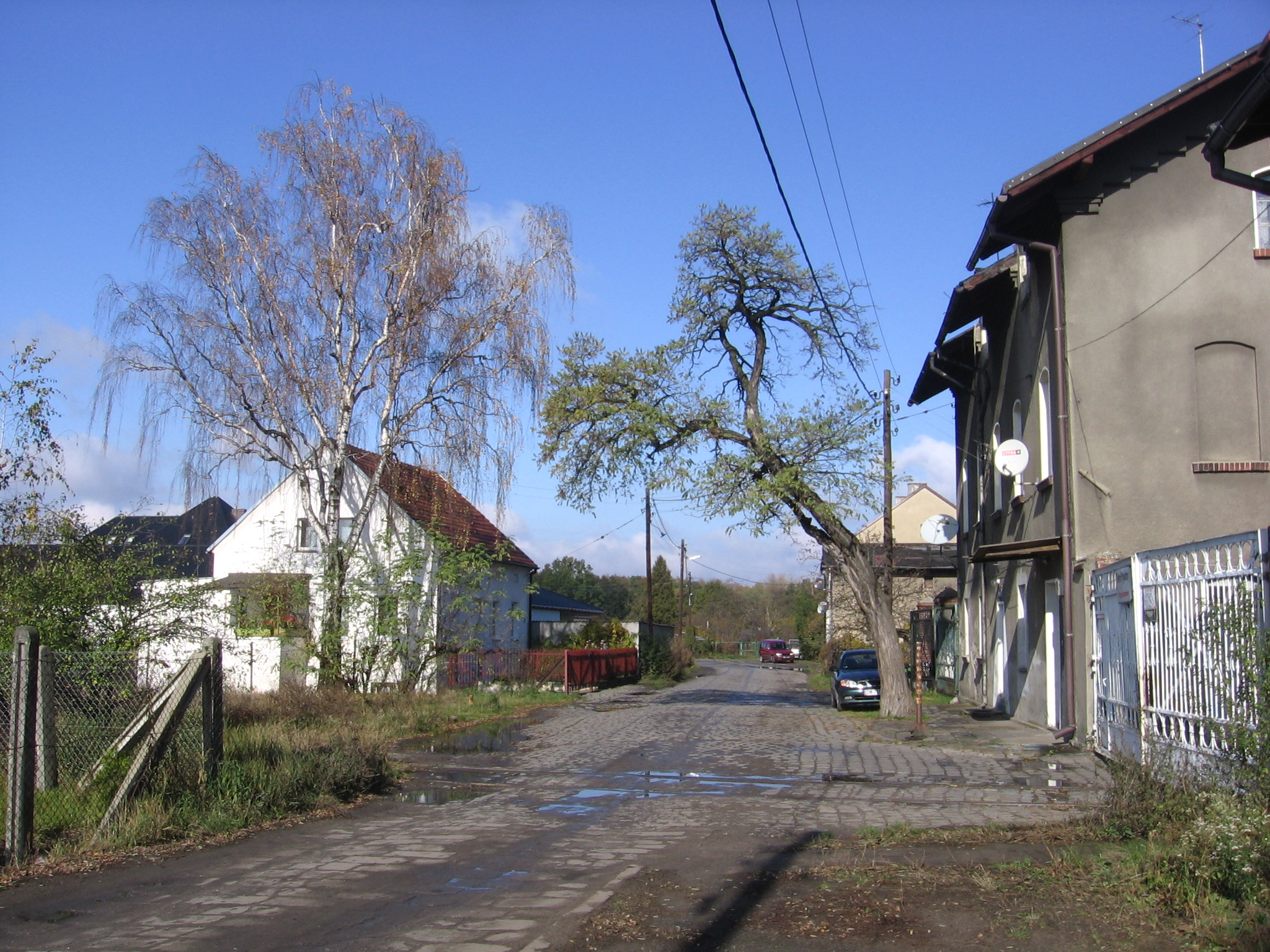 Wrocław, Wilczy Kąt